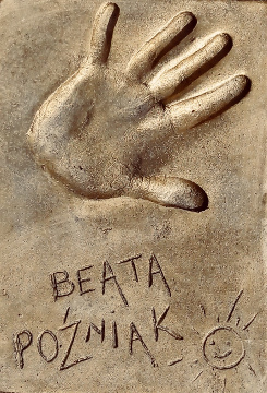 Beata Poźniak. Odcisk dłoni, Międzyzdroje.